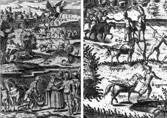 Girolamo Porro(1520-1604), illustration d'Orlando furioso, Venise, F. Franceschi, en 1584. Gravure sur cuivre 20,3 x 14 cm. Paris, Bibliothèque nationale de France.